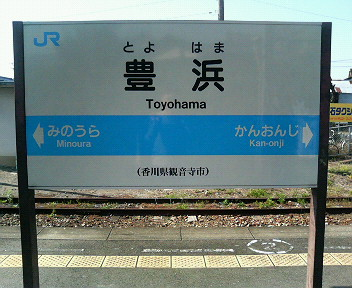 香川県観音寺市の豊浜駅の駅名案内板